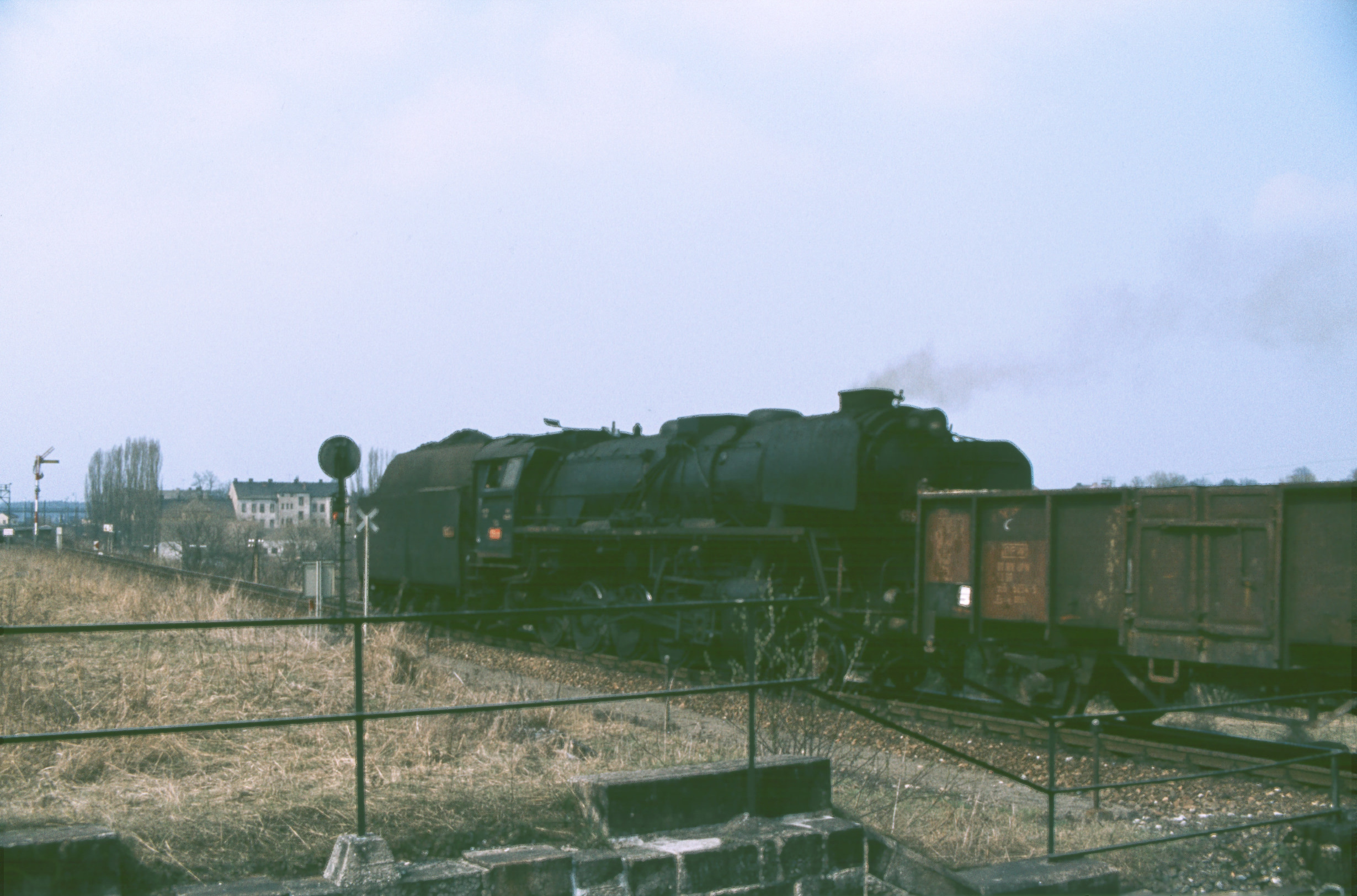 ČSD-Baureihe 556.0 bei der Ausfahrt Gmünd/NÖ